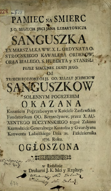 Титульний аркуш панегірика Янушеві Олександру Санґушку виголошеного Авксентієм Бучинським в Бернардинському монастирі міста Заслава на Волині. Надрукований у Любліні 1776 року.